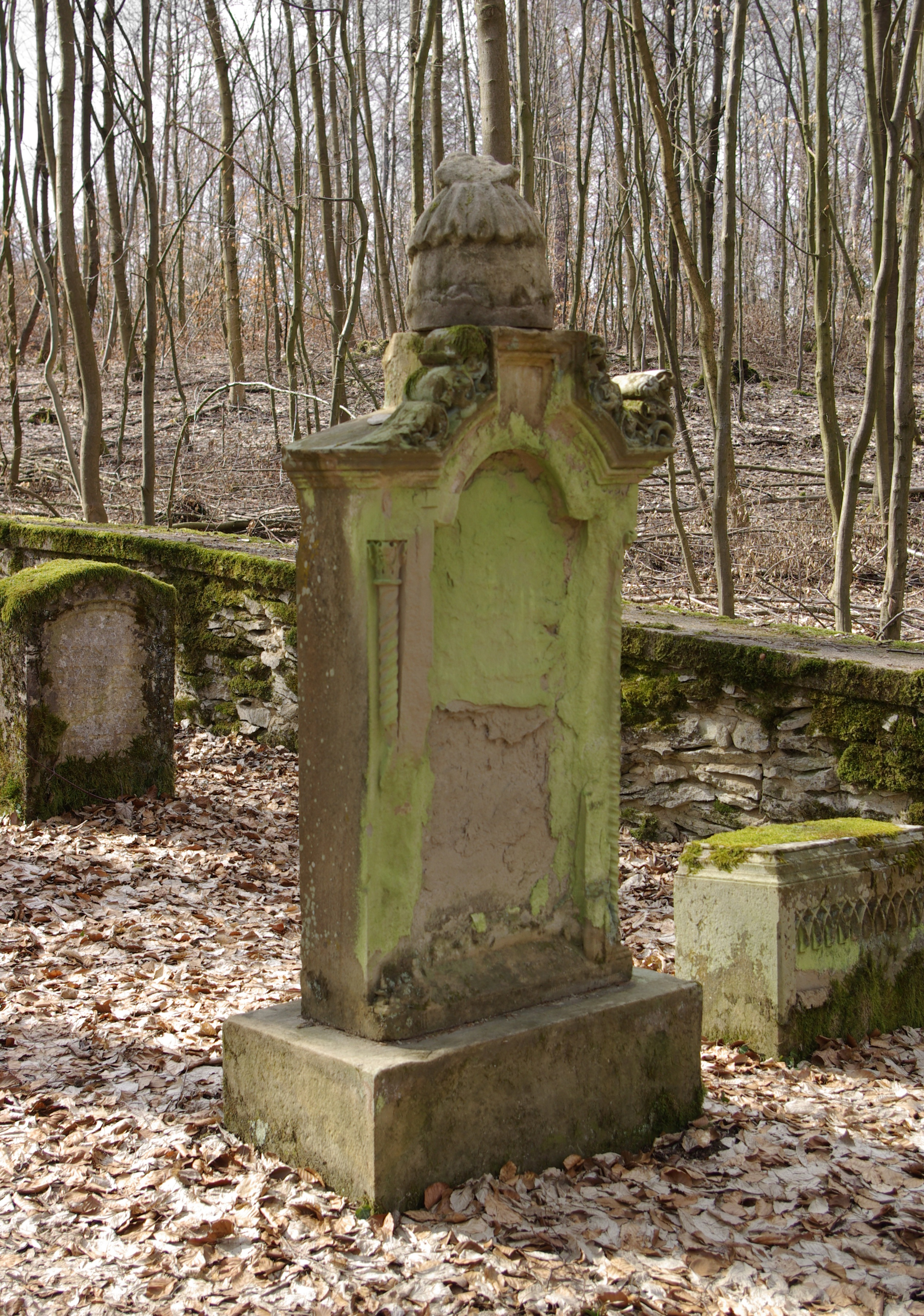 Jüdischer Friedhof in Heiligenstadt in Oberfranken